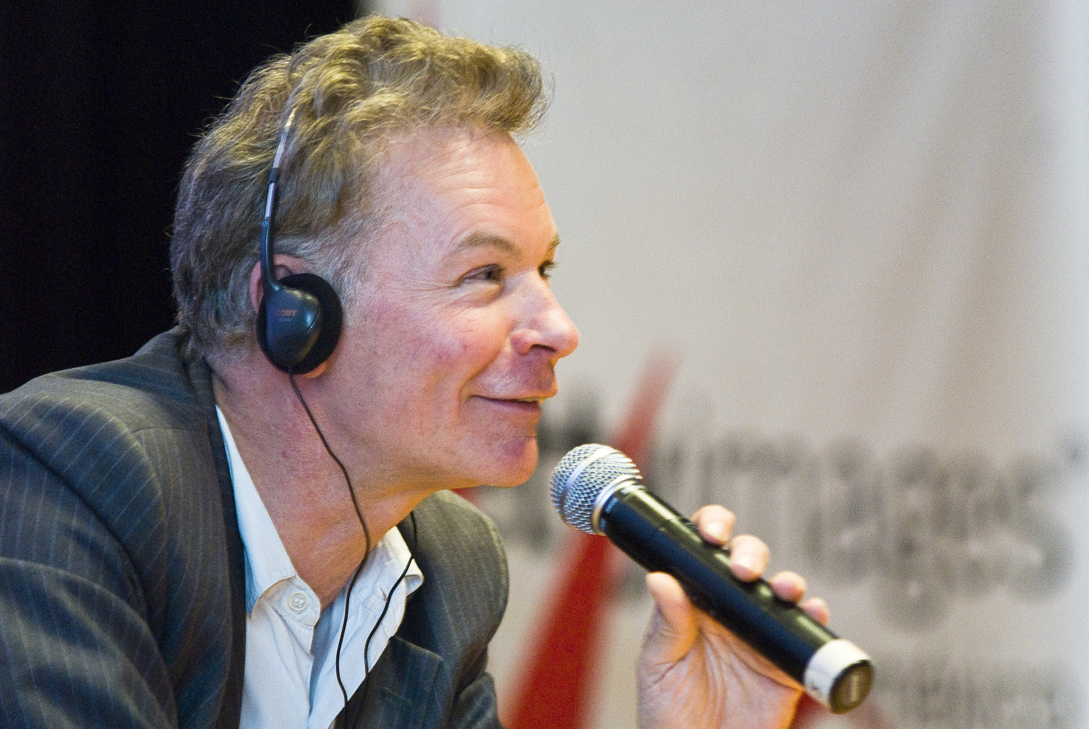 Julien Temple en el Encuentro con creadores, en el marco de las actividades del Festival Internacional de Cine de Guadalajara en su edición 25. 17 de Marzo, 2010. Guadalajara, México. © Cortesía FICG25 / Gonzalo García Ramírez.